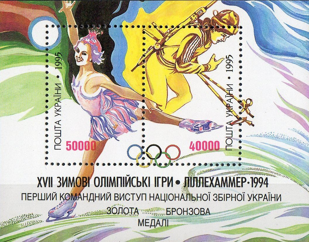 Поштові марки «XVII зимові Олімпійські ігри у Ліллехаммері (1994 р.). Перший командний виступ національної збірної України»